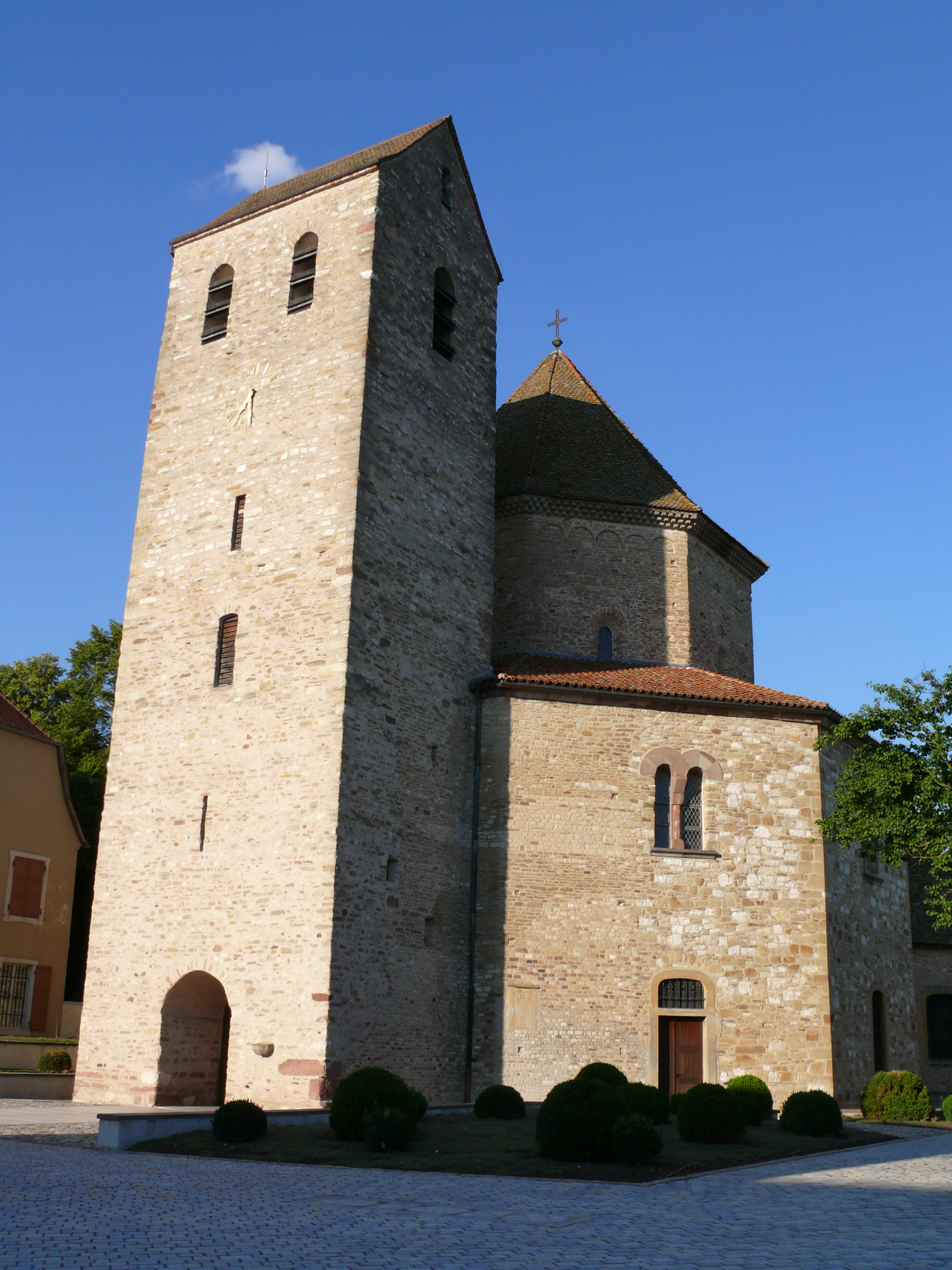 Ottmarsheim - Eglise Saint-Pierre-et-Saint-Paul - Clocher